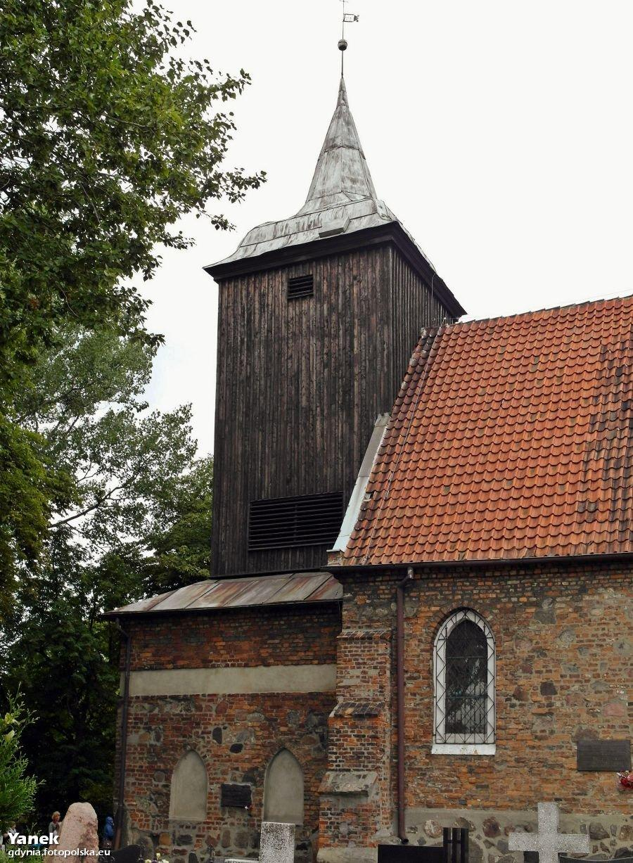 Drewniana wieża kościelna z XVII wieku.